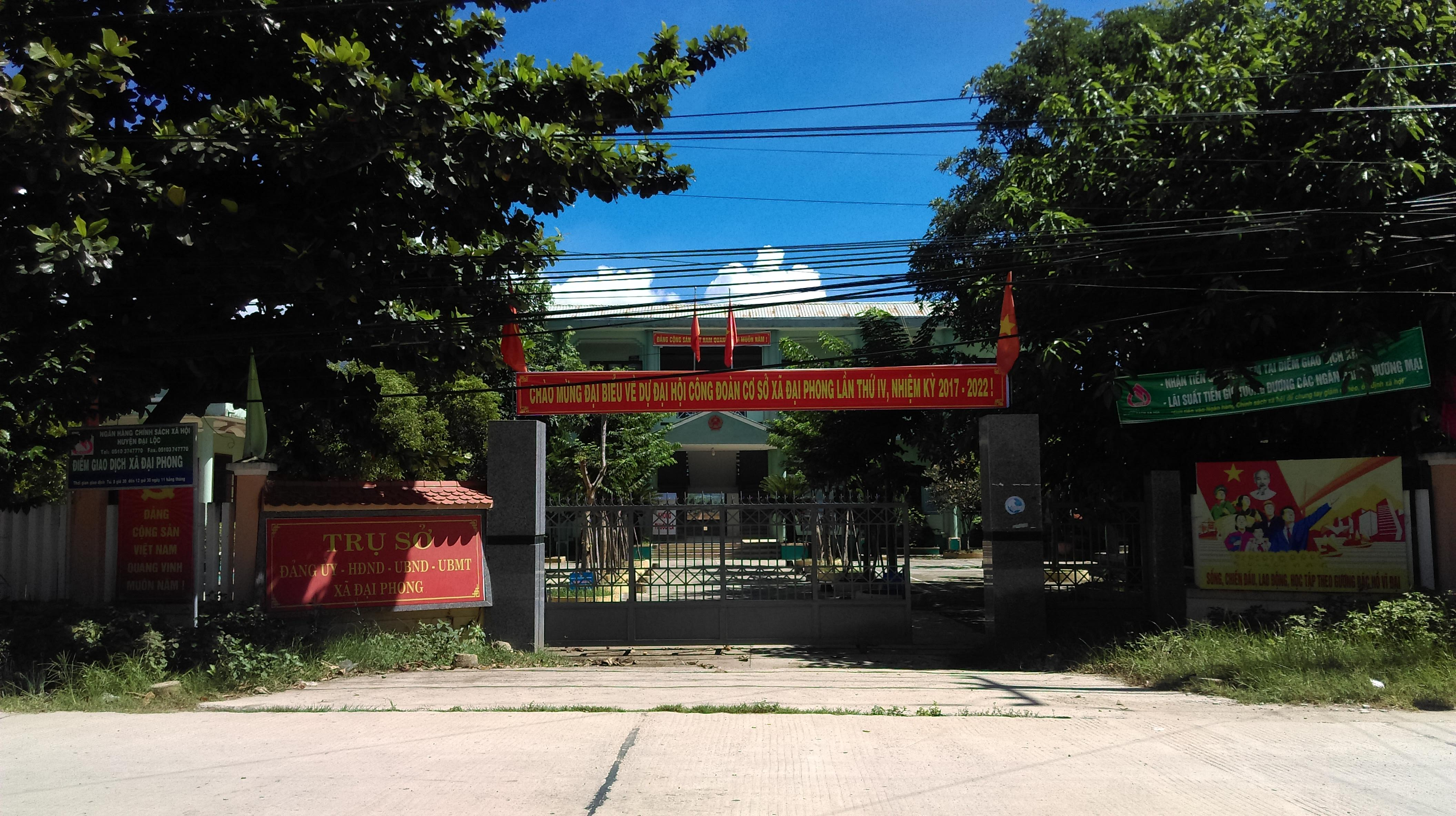 UBND xã Đại Phong, Đại Lộc, Quảng Nam